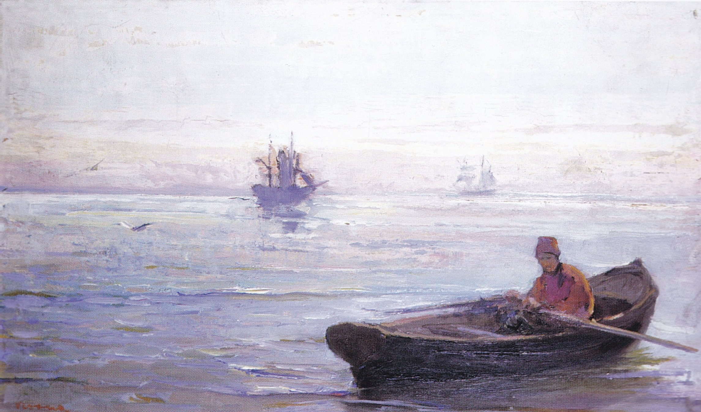 La Sulina